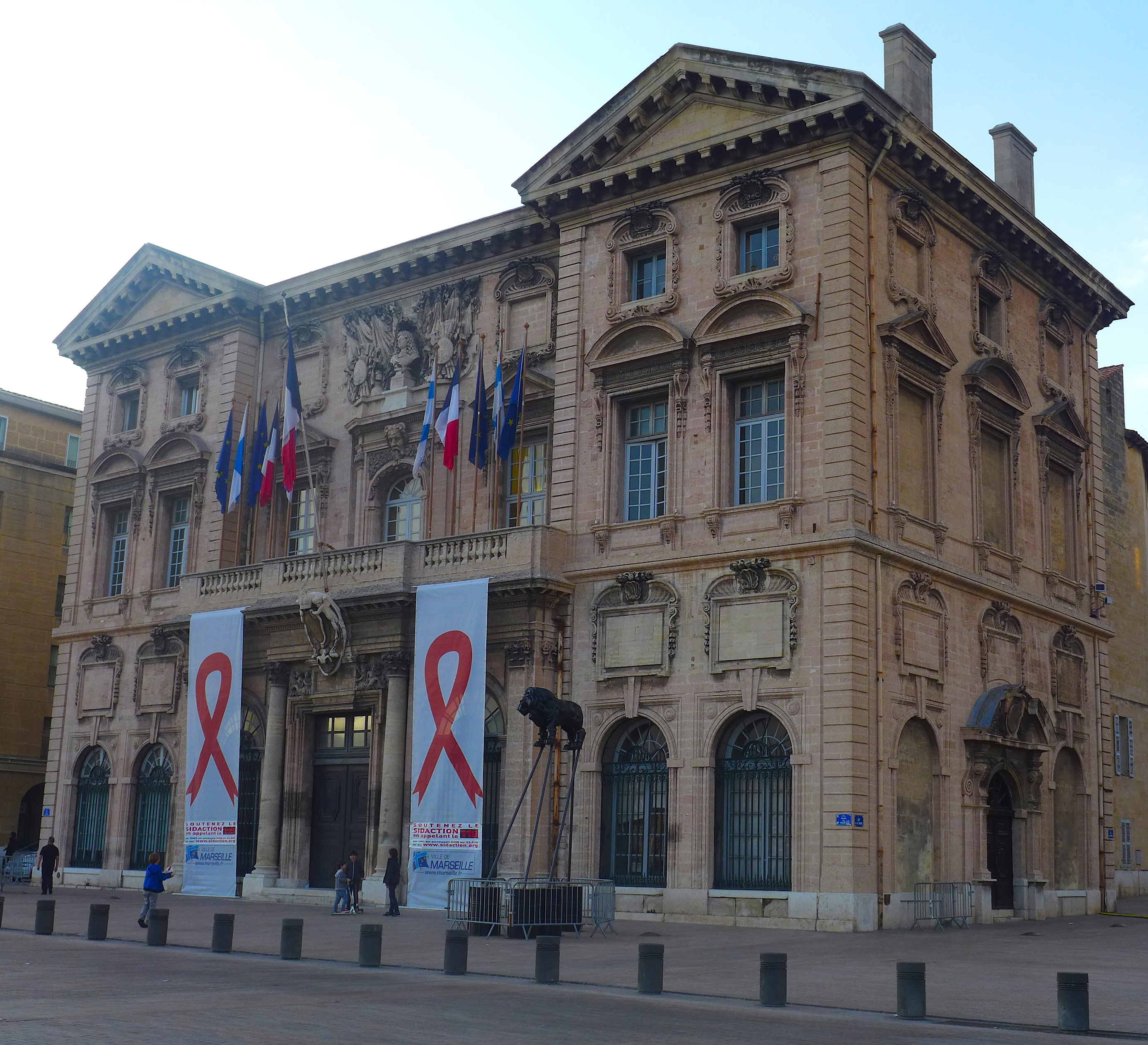 Hôtel de ville: Marseille, Bouche du Rhone, France .